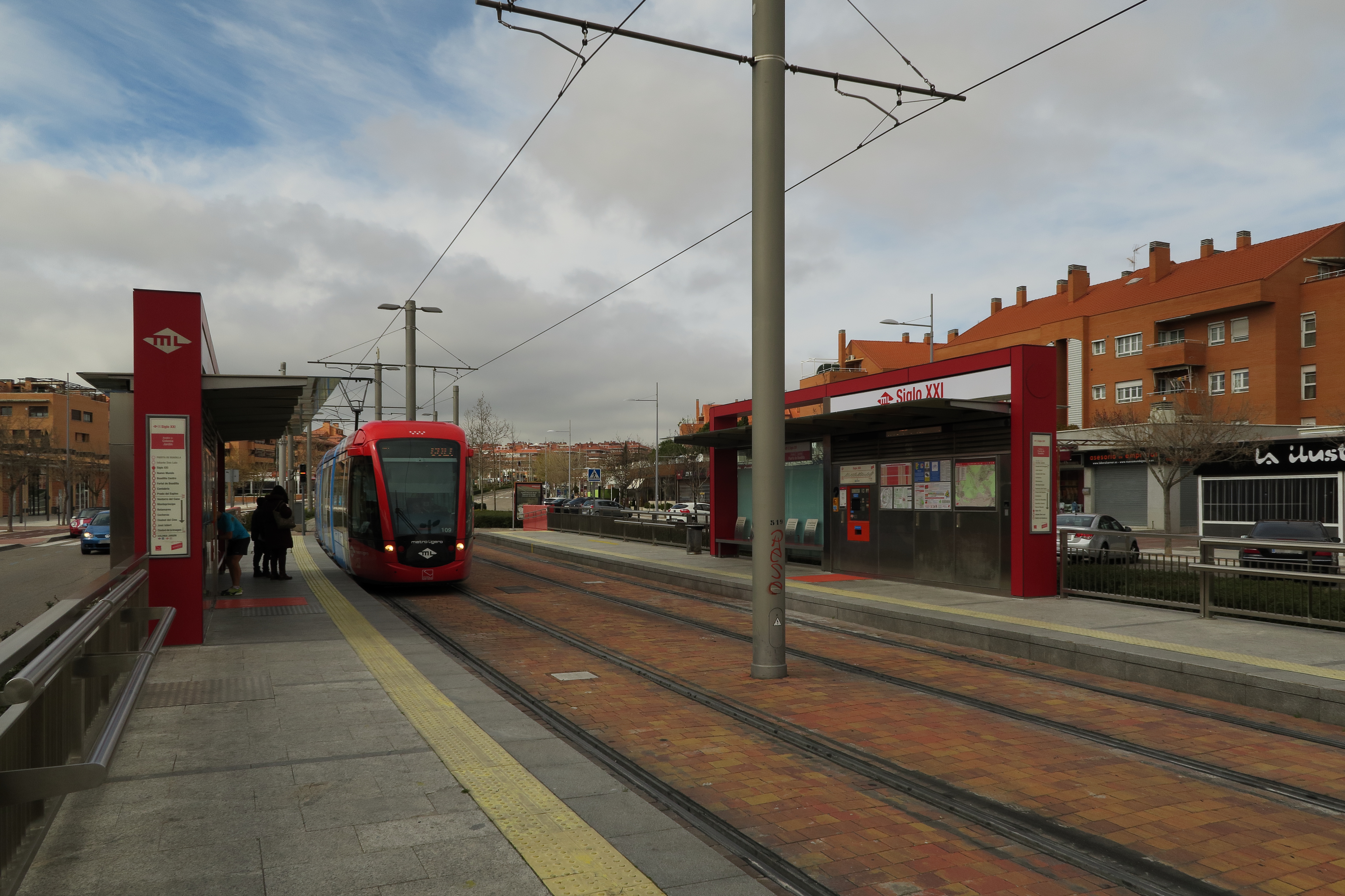 Estación de Siglo XXI